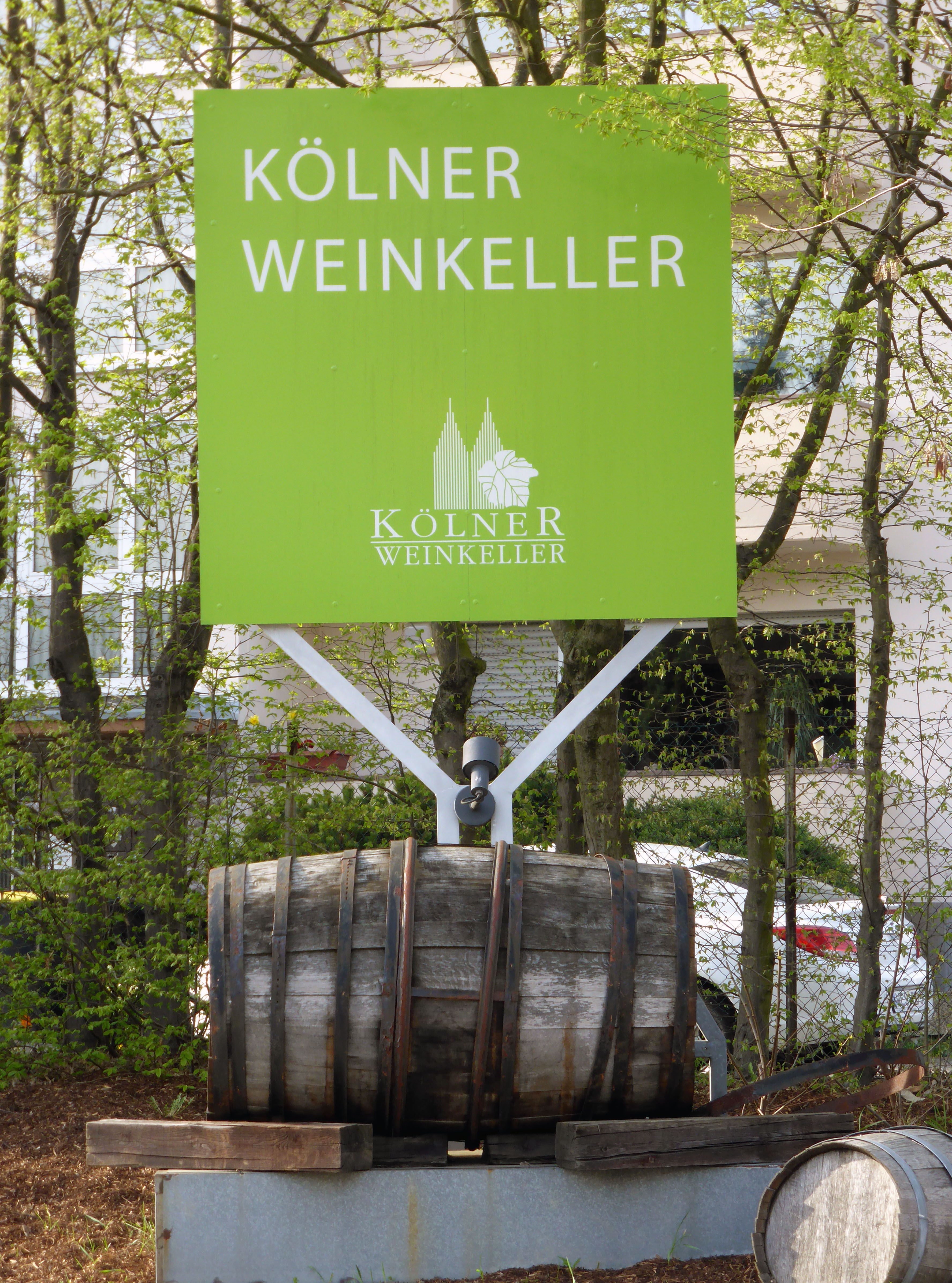 Kölner Weinkeller